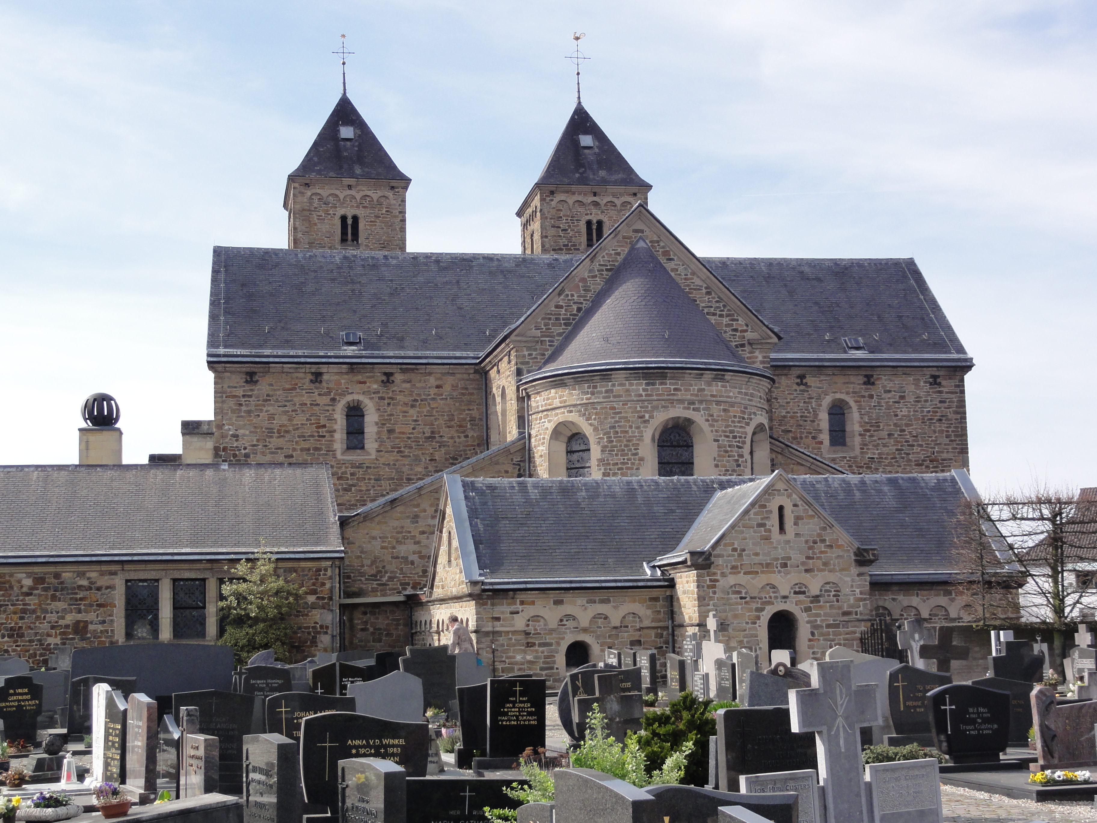 Susteren, Limburg, basiliek achterkant